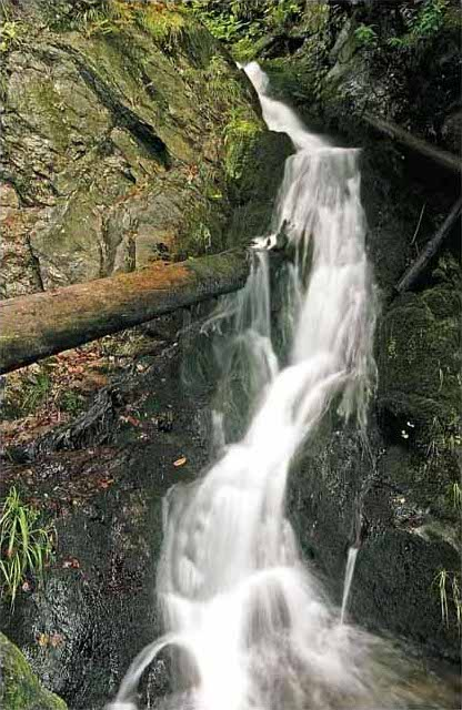 Dolní část vodopádu Na Strašidlech.